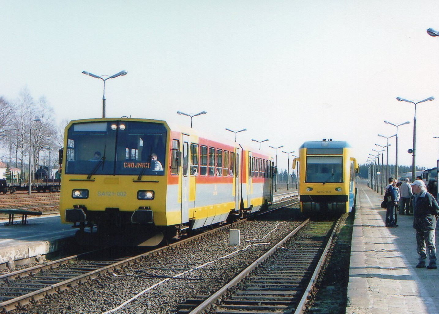 Kościerzyna - 31.3.2007r. SA103-006 i SA121-002.